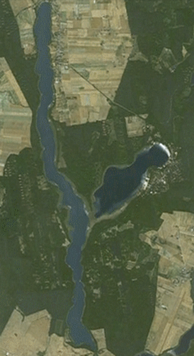 Zdjęcie satelitarne jeziora ostrowskiego